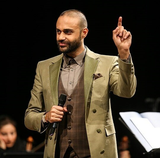 حمید حامی در کنسرت تالار وحدت سی آذر ۱۳۹۵